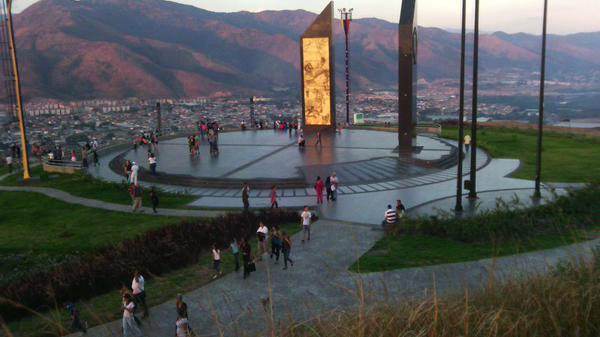 RRRRR